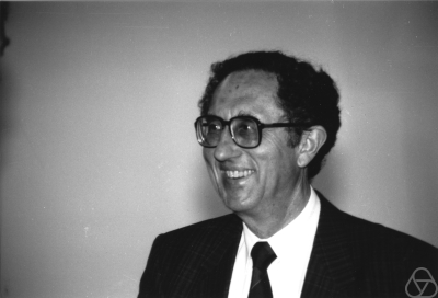 Heinz Bauer